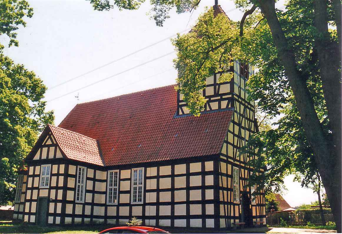 Fachwerkkirche Luckow, Äußeres, linke Seite